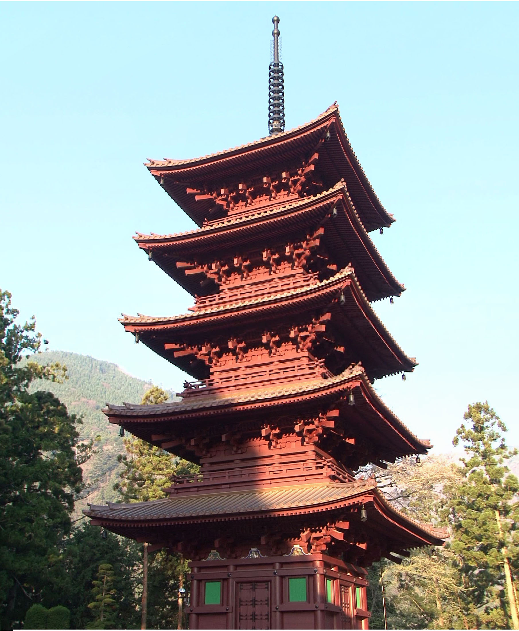 身延山五重塔